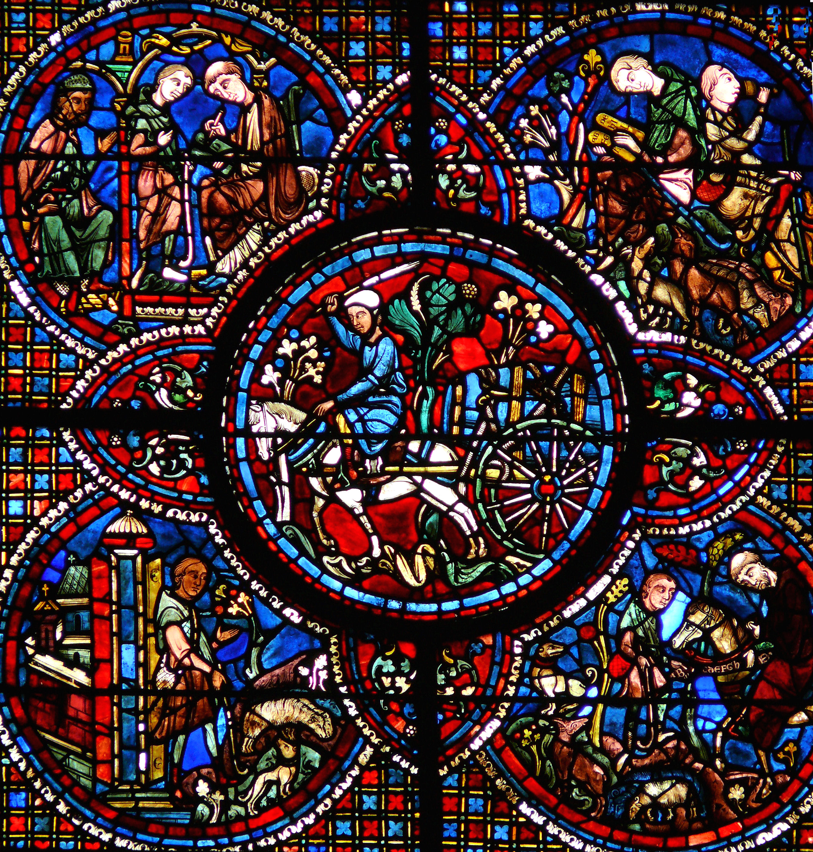 Kathedrale von Chartres; Lubinus-Fenster im nördlichen Obergaden des Langhauses, um 1210/Innere Rundscheibe: Transport eines Weinfasses auf einem Pferdekarren